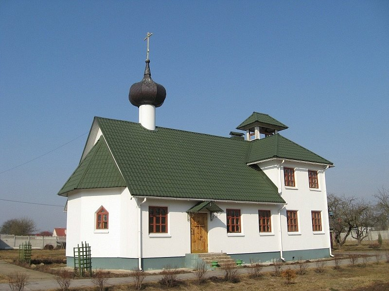 Крупіца. Царква ў нядзельнай школе